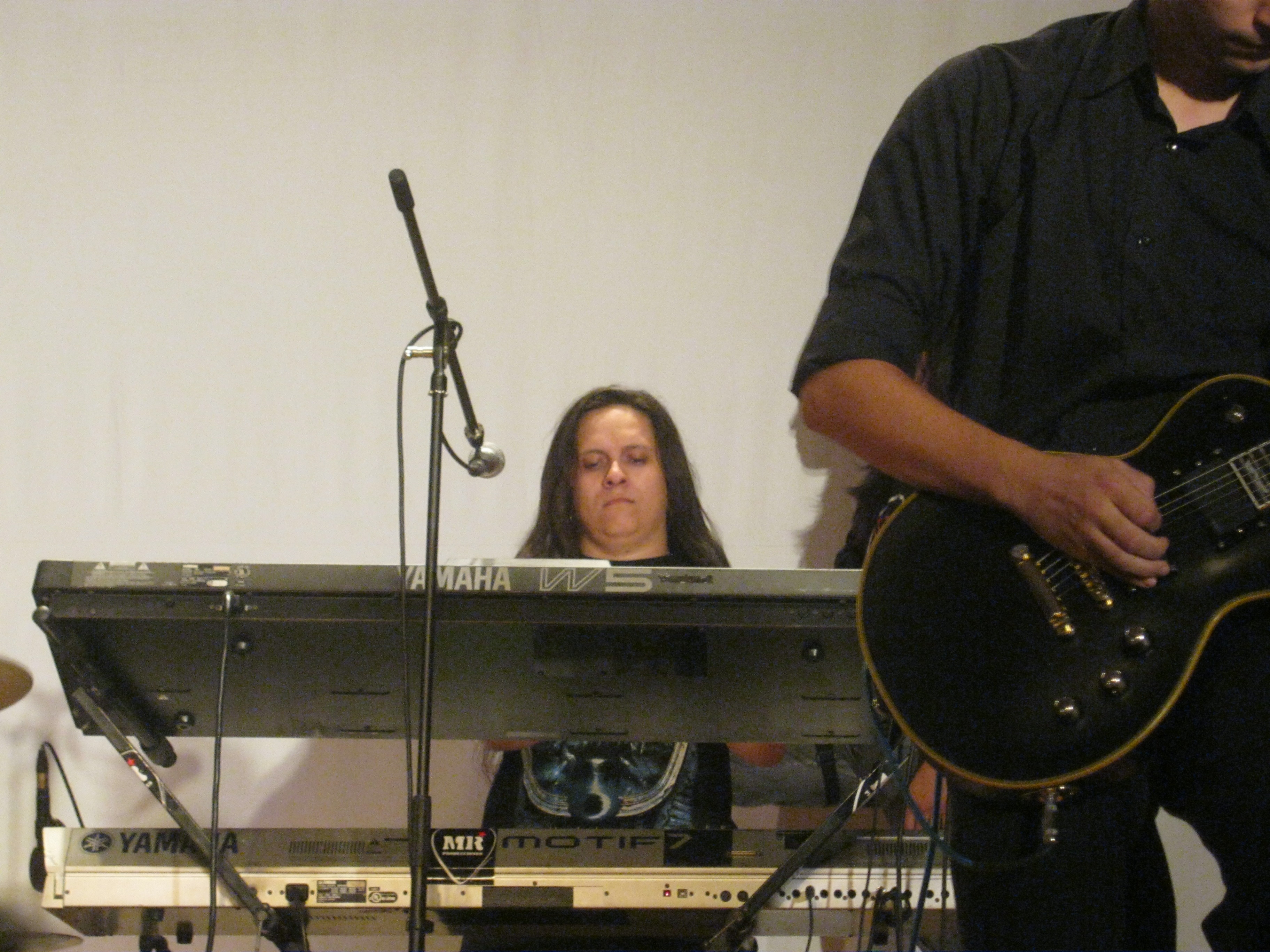 Concierto en conmemoración de los 15 años de la banda caleña de metal progresivo Legend Maker